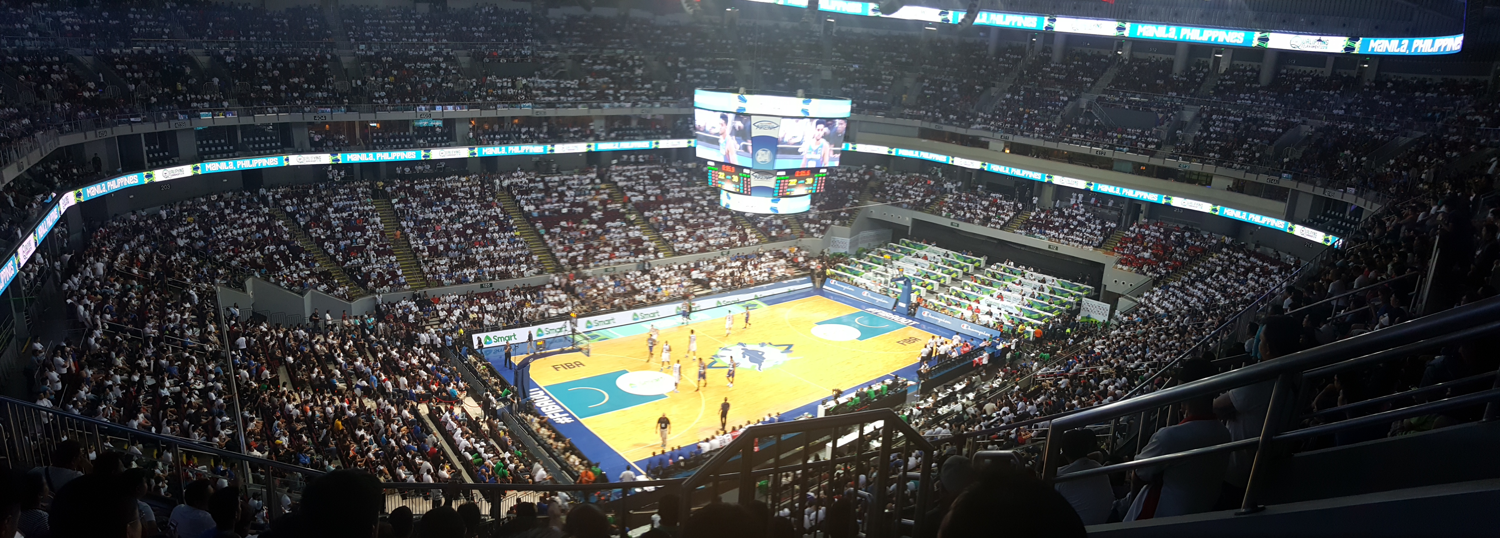 FIBA OQT - France vs Philippines 2016-0705